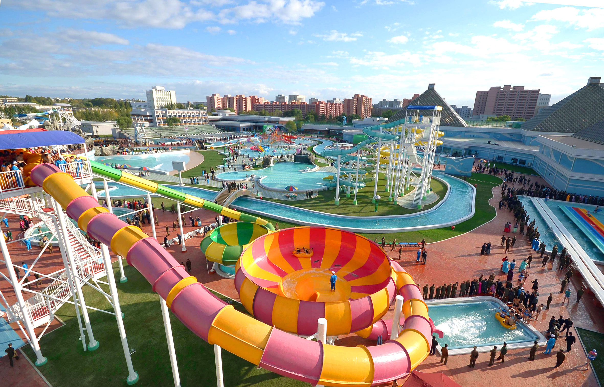 Outdoor water park